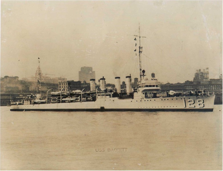 USS Babbitt (DD-128)